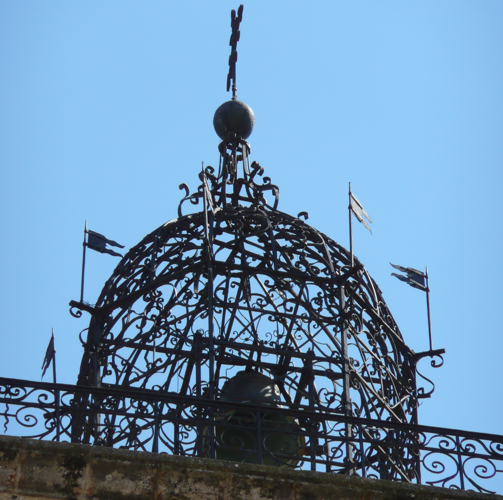 campanile de l'église St Sauveur de Manosque